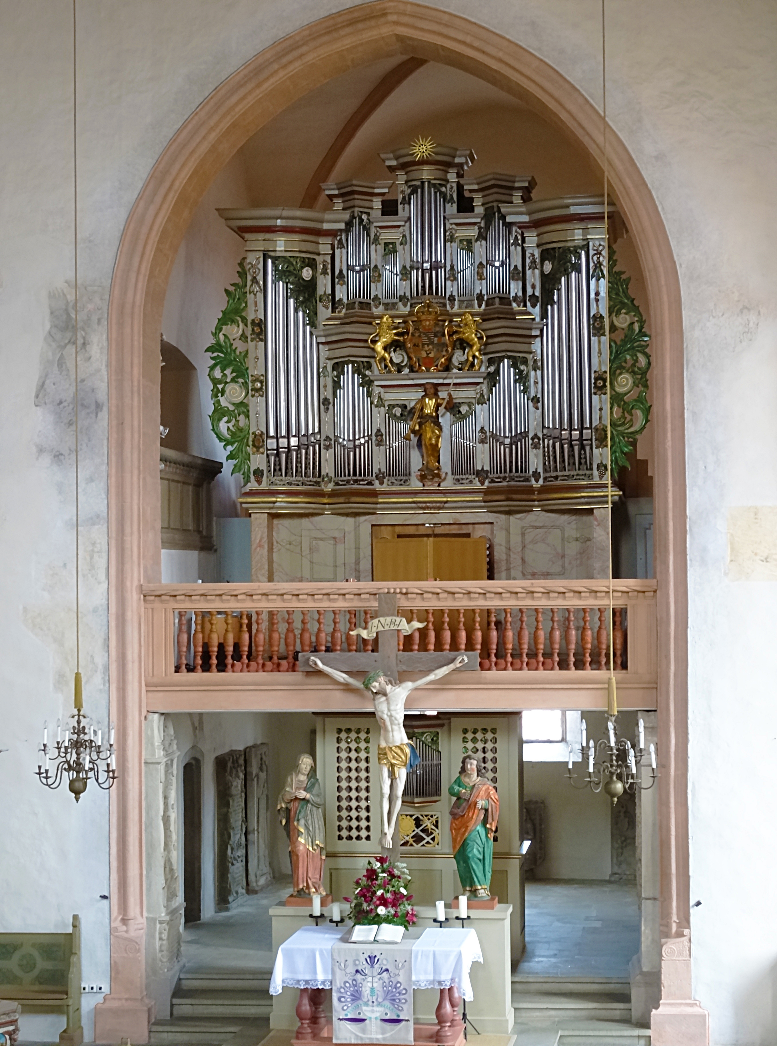 Chor mit Altar und Orgel von 1738 und Graumalereien, Kirchenburg Ostheim vor der Rhön